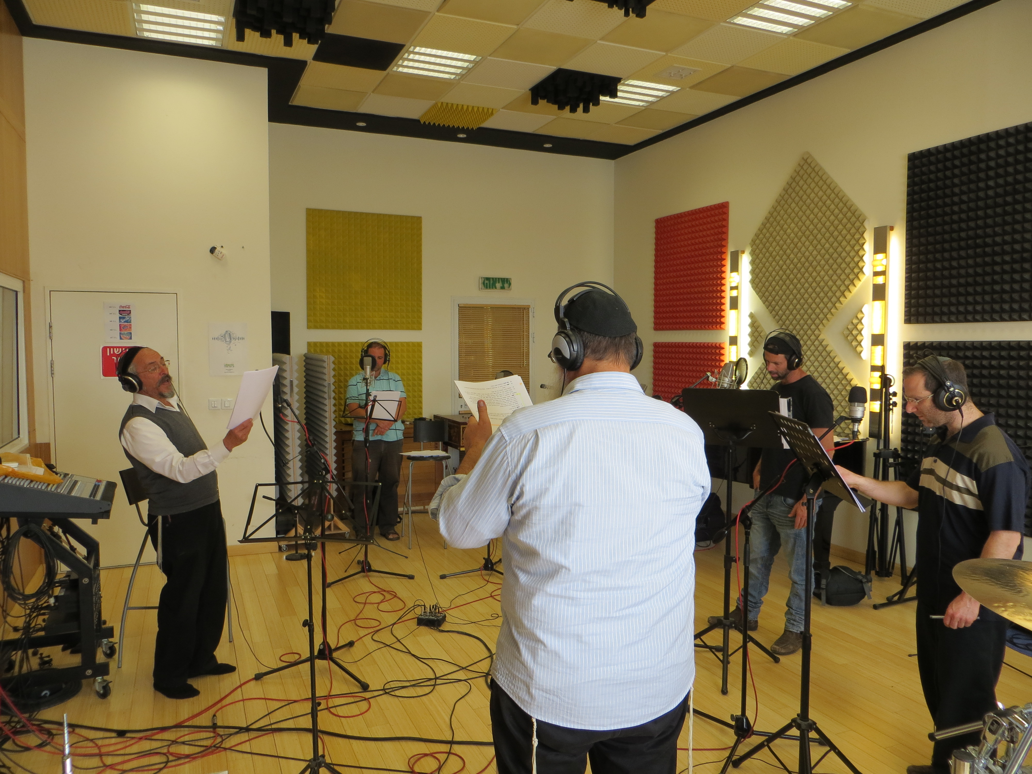 תיאטרון אודיו אבות האומה